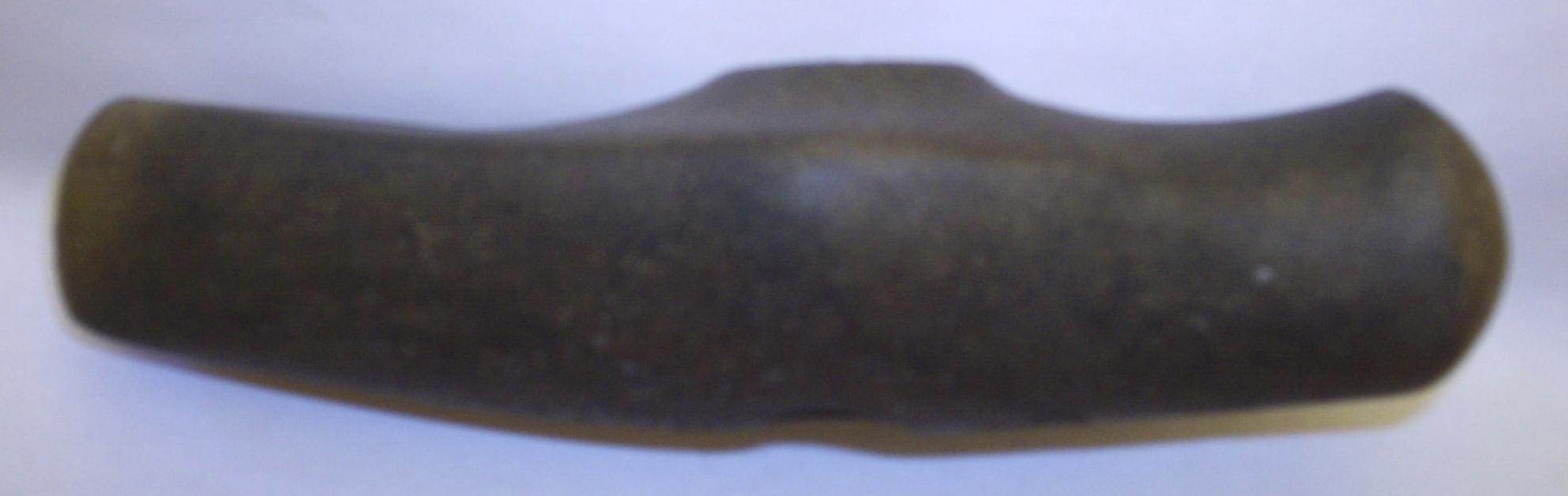 Båtyxa från Tutaryd socken i Småland, fotograferad den 18 oktober 2005 av Harri Blomberg.